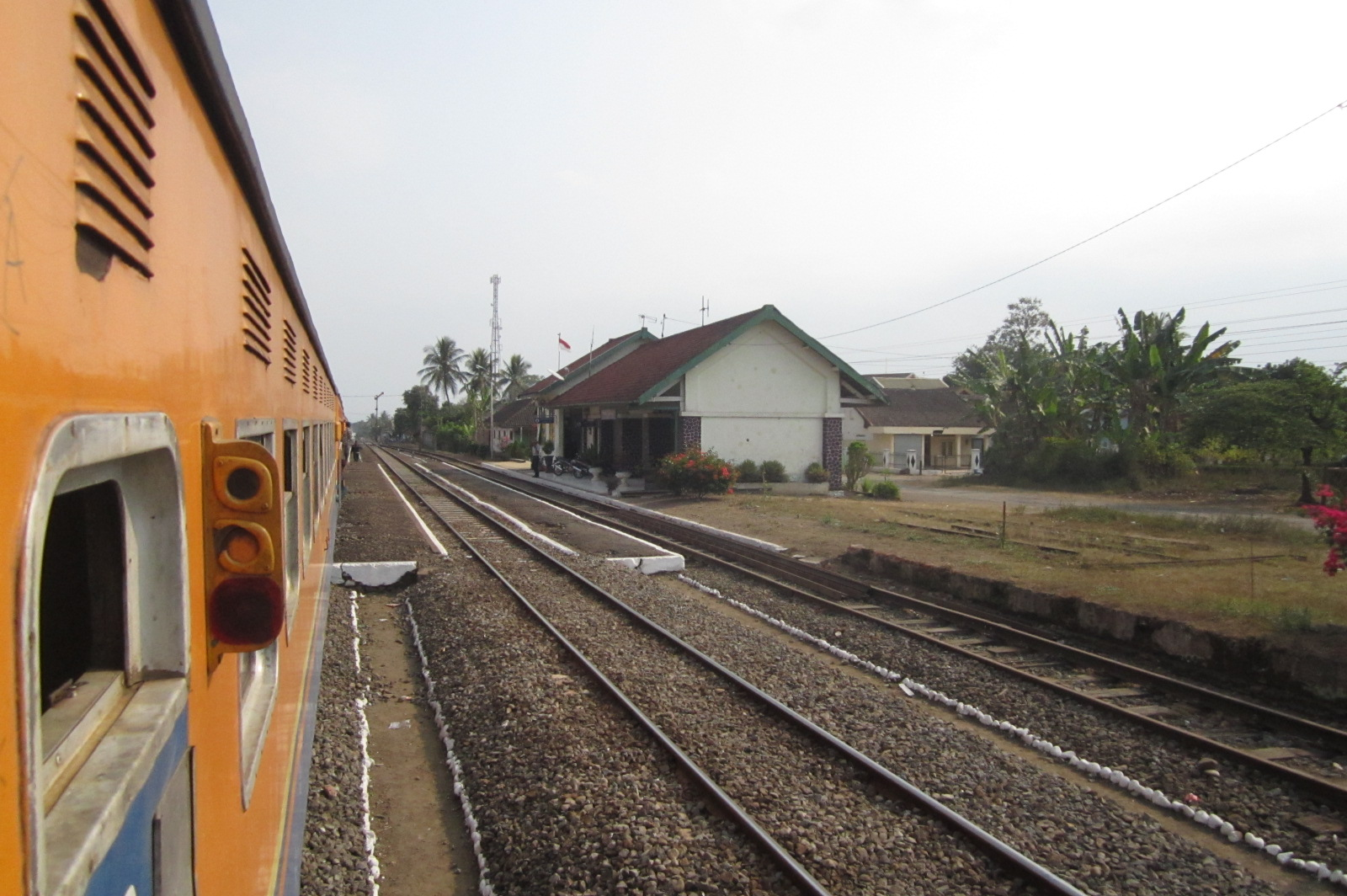 Stasiun kereta api Pakisaji.